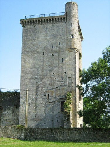 Donjon de Lesparres